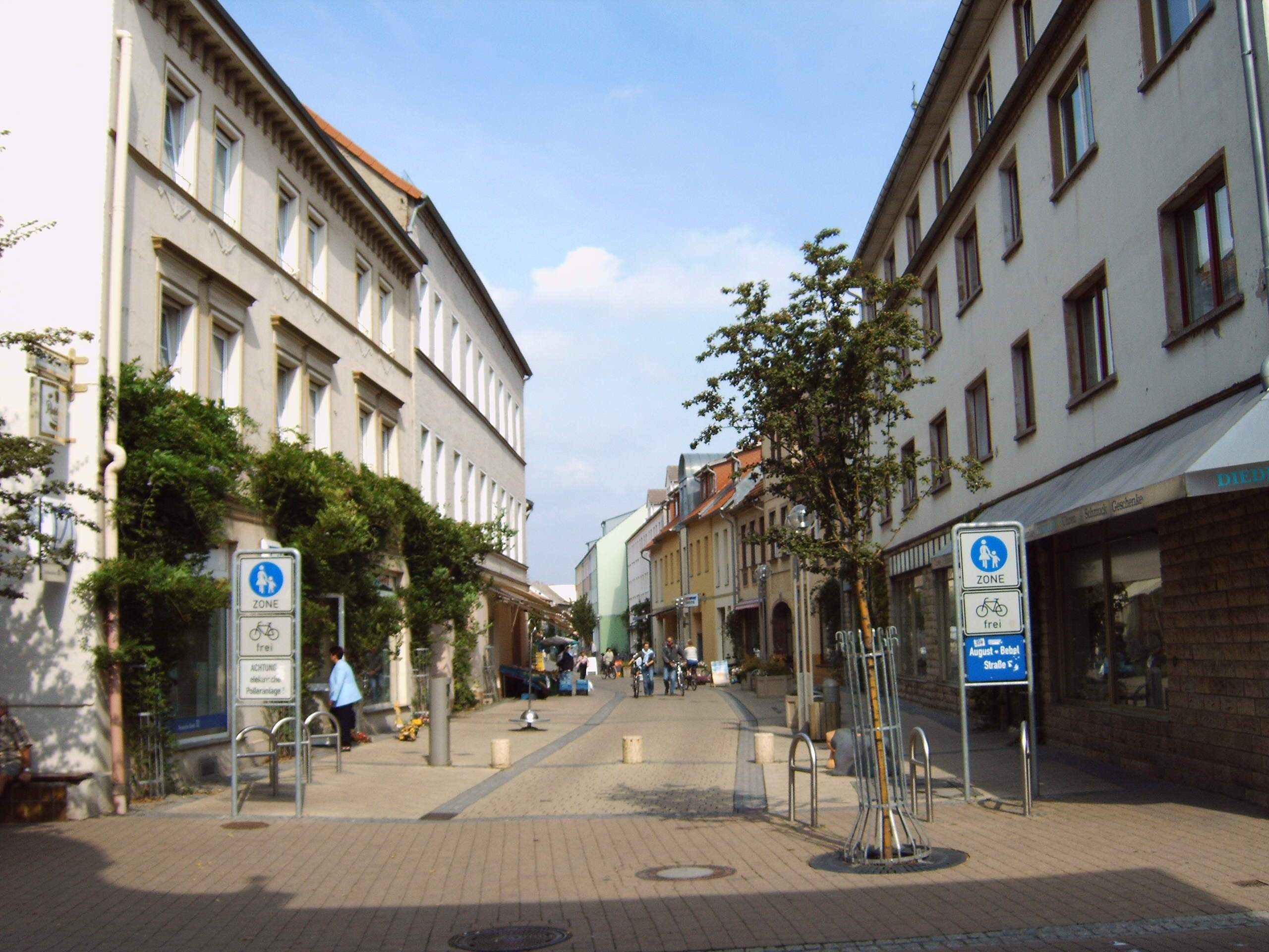 Eingang zur Fußgängerzone von Wolmirstedt, 14.9.2005